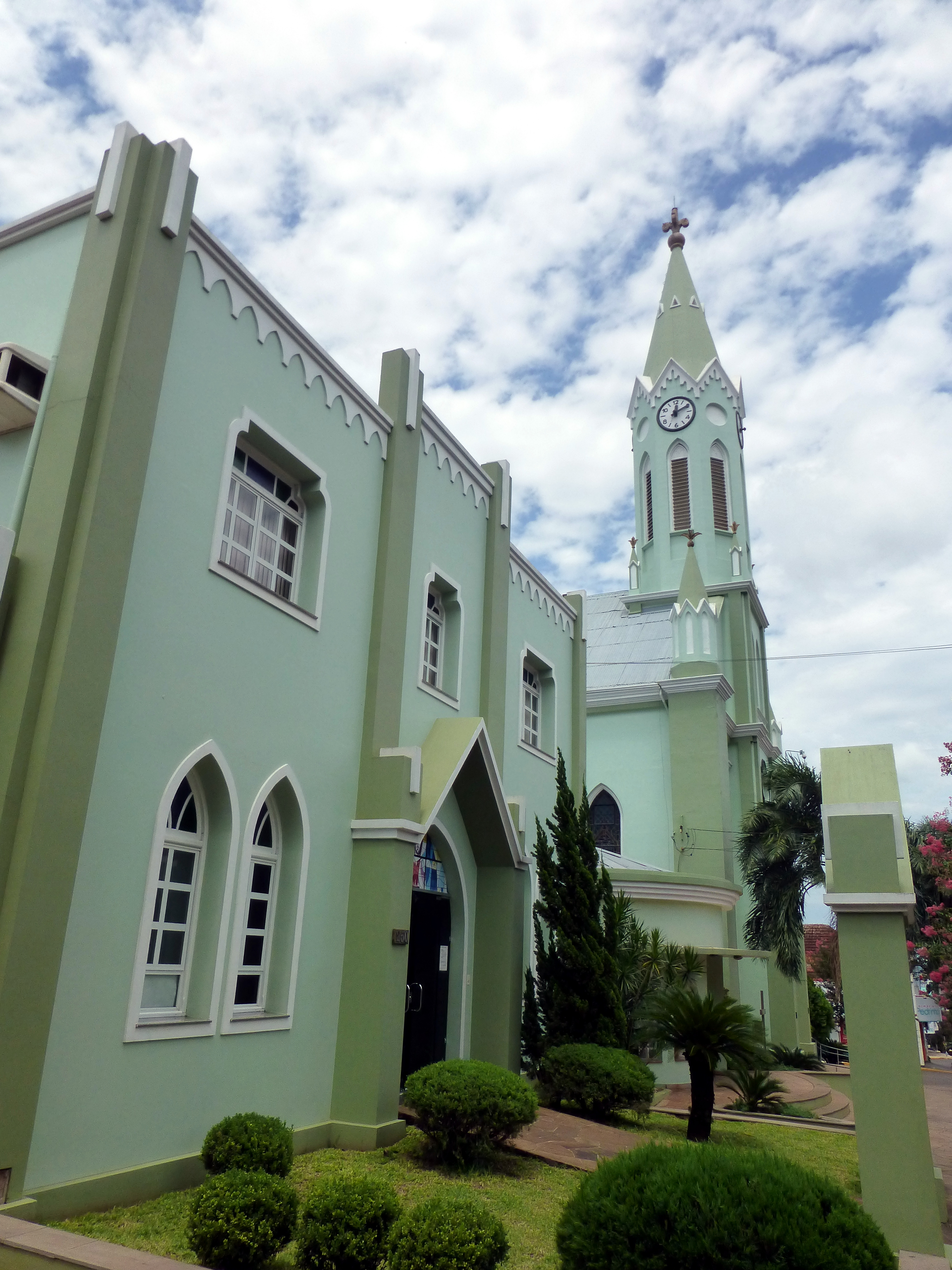 La iglesia Sagrado Corazón de Jesús en Santa Rosa, Rio Grande do Sul, Brasil.